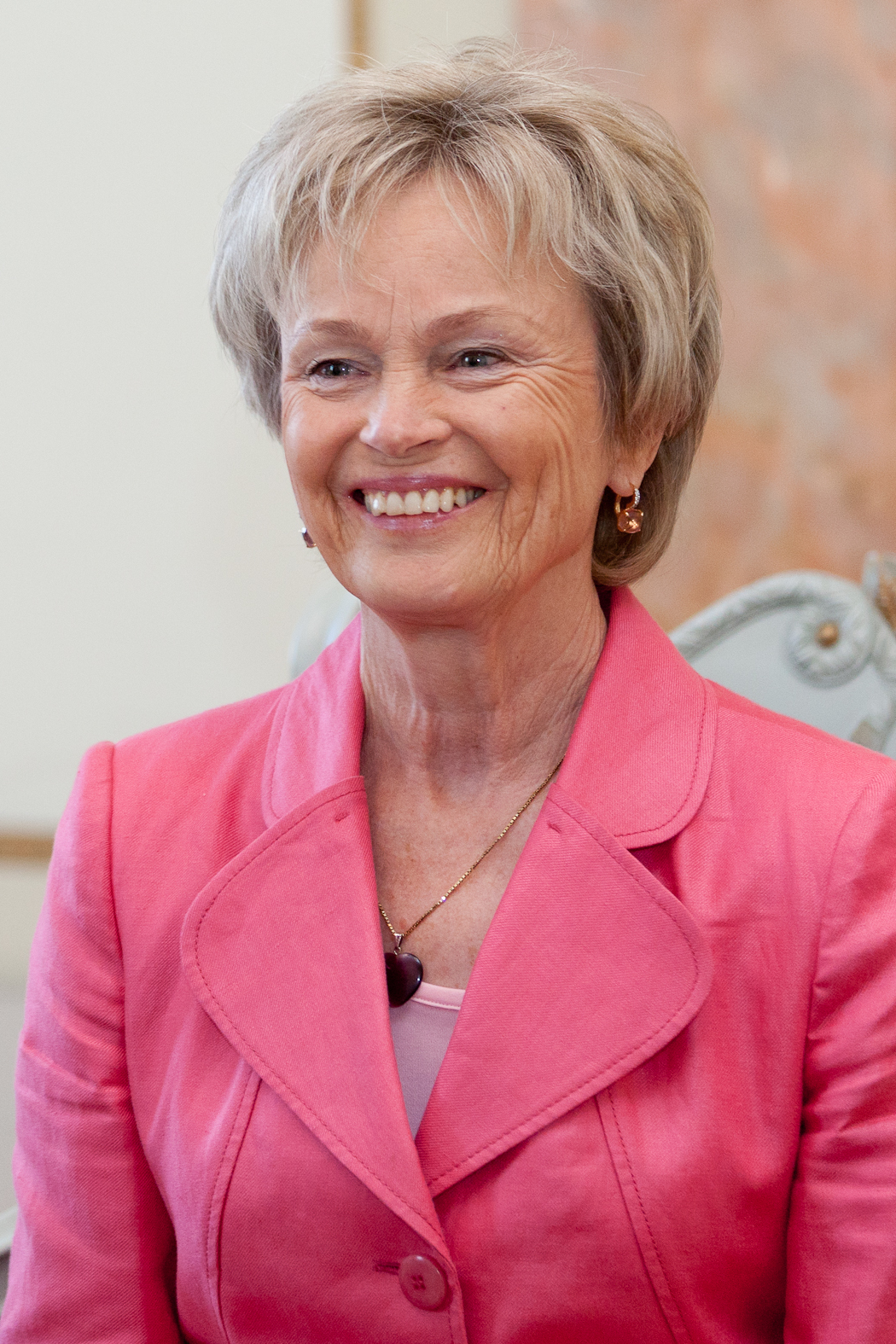 Foto: Toms Norde, Valsts kanceleja